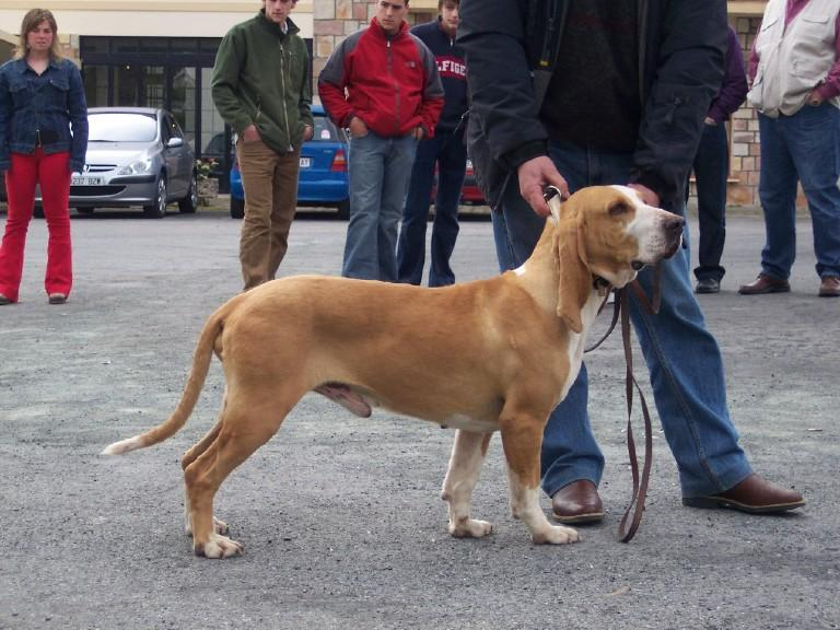 Foto del sabueso español Angoi, propiedad de la cuadrilla Os Novos, de A Fonsagrada (Lugo)